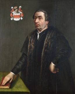 Jorden Jordensz van Foreest (1494-1559)